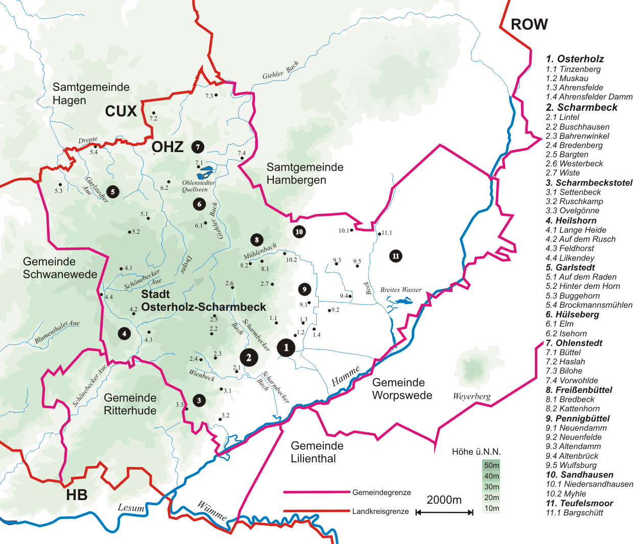 Topografische Karte des Stadtgebiets von Osterholz-Scharmbeck. Neben der Hamme im östlichen Teil fällt insbesondere der Rücken der Osterholzer-Geest (Lange Heide) mit den zahlreichen Geestrandbächen auf.